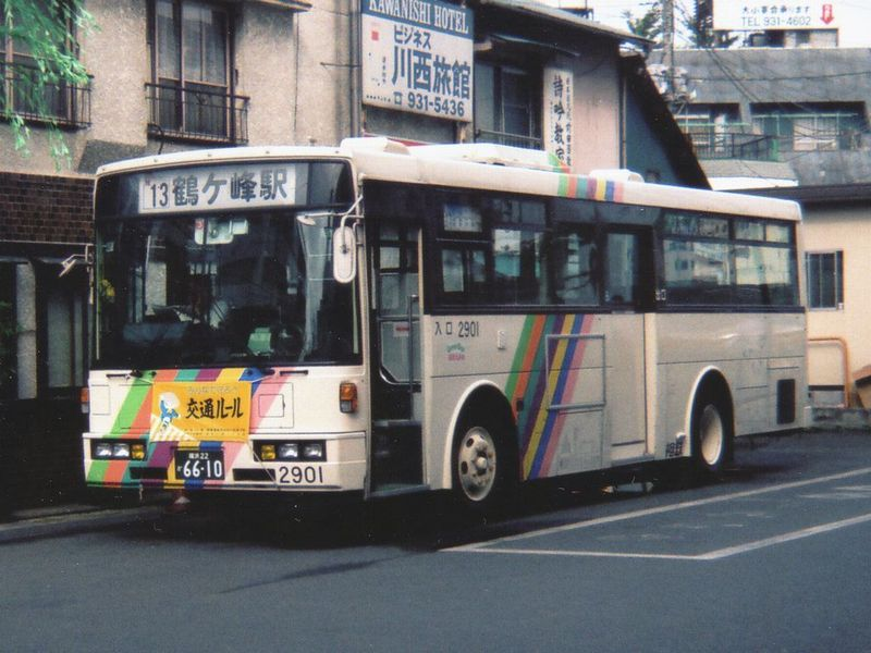 Sotetsu 2901 Isuzu P-LV314L at Nakayama Sta.